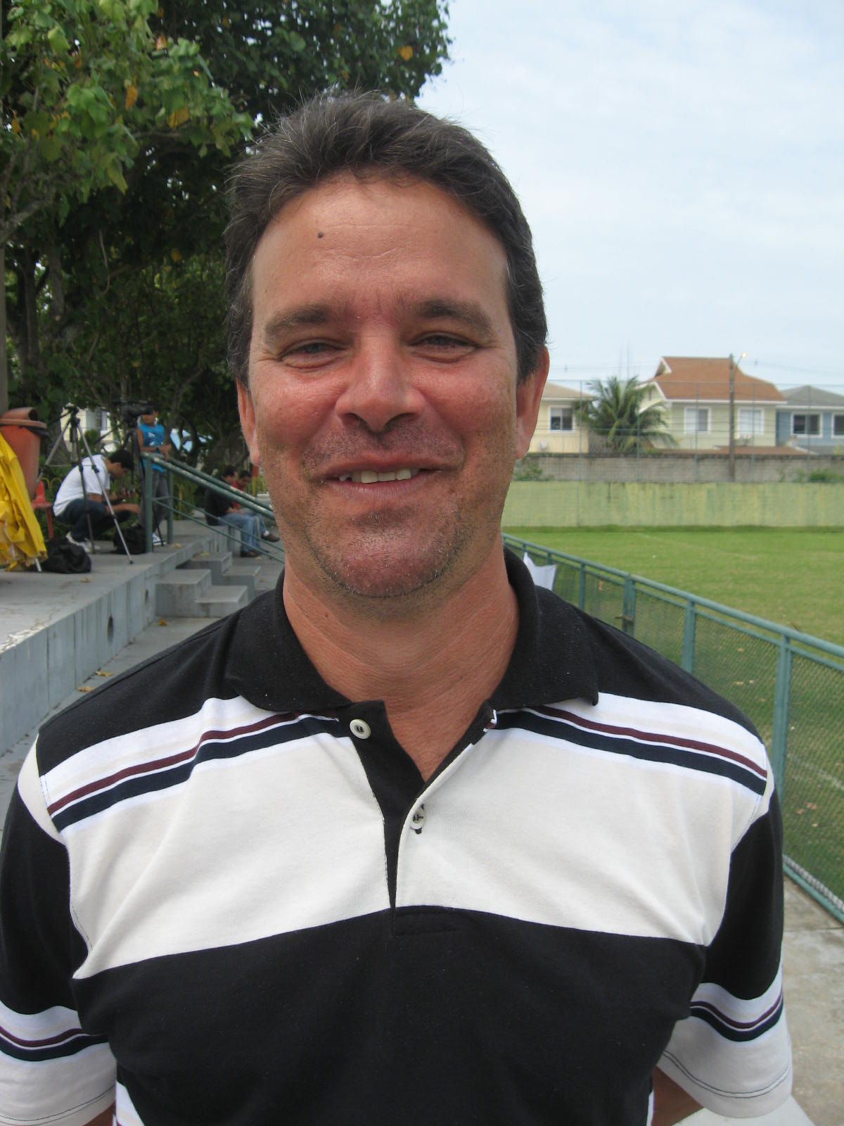 Ézio, ex-atleta do Fluminense.